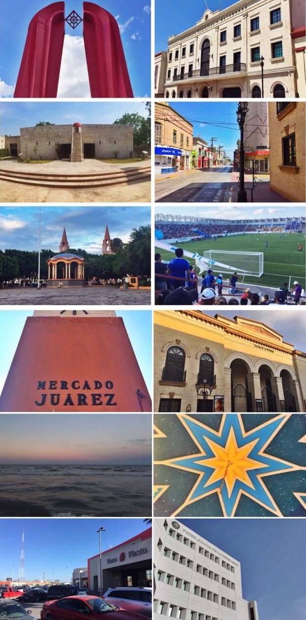 Algunos lugares representativos de H. Matamoros.